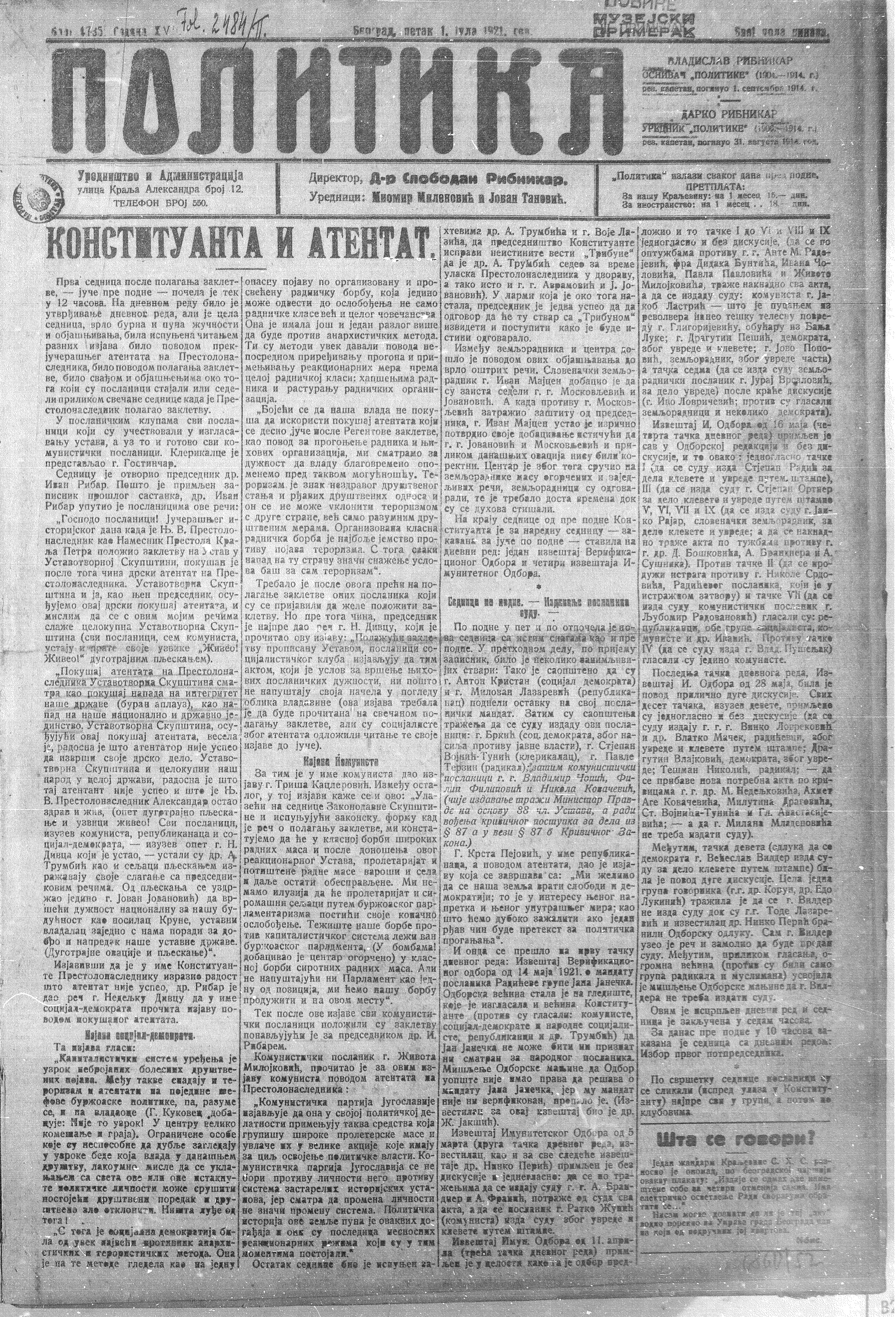 Srpskohrvatski / српскохрватски: Politika od 01. 07. 1921. sa naslovnom stranicom o neuspelom atentatu na regenta Aleksandra.